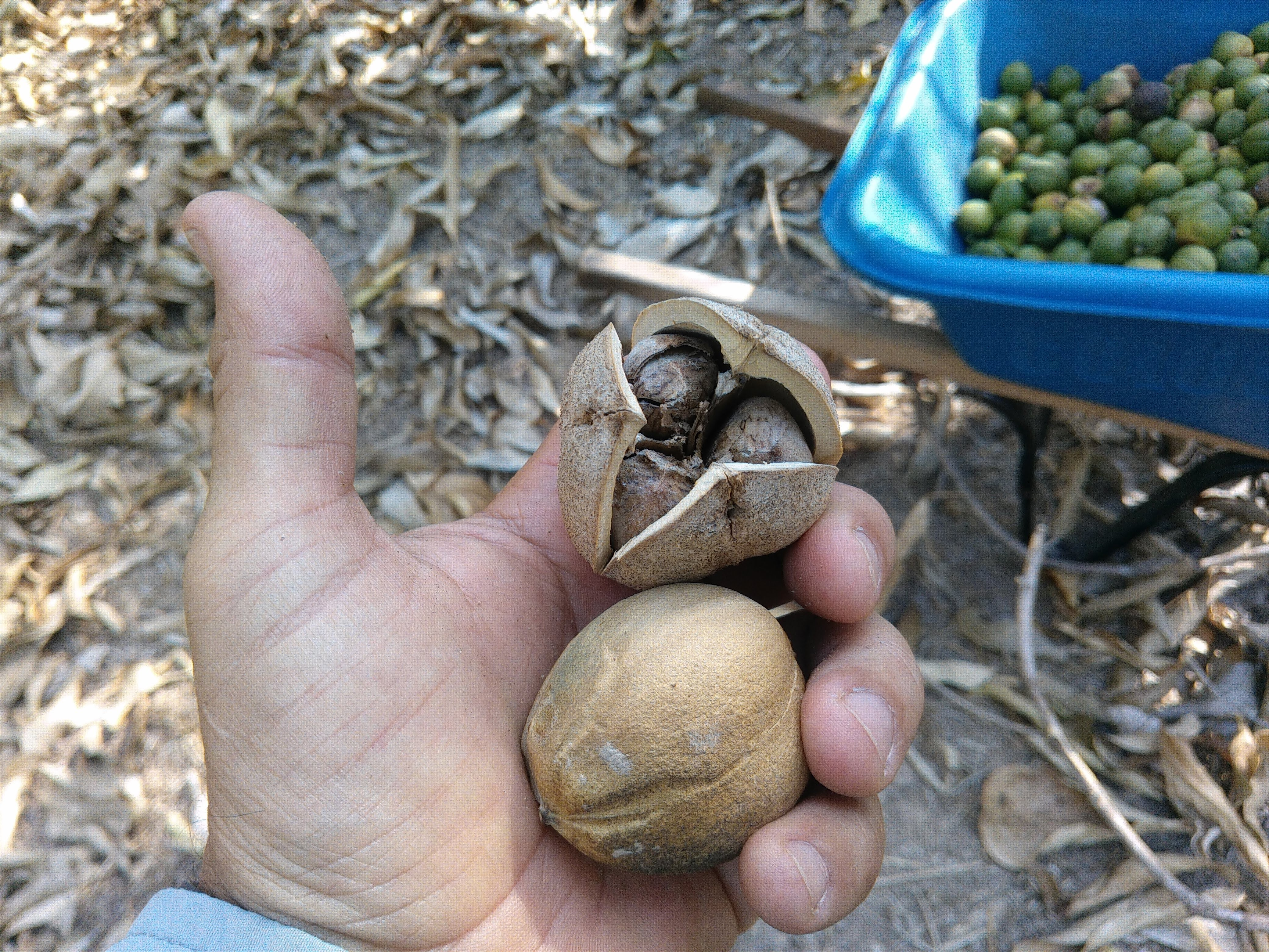 C. orinocense fruta de cacay madura